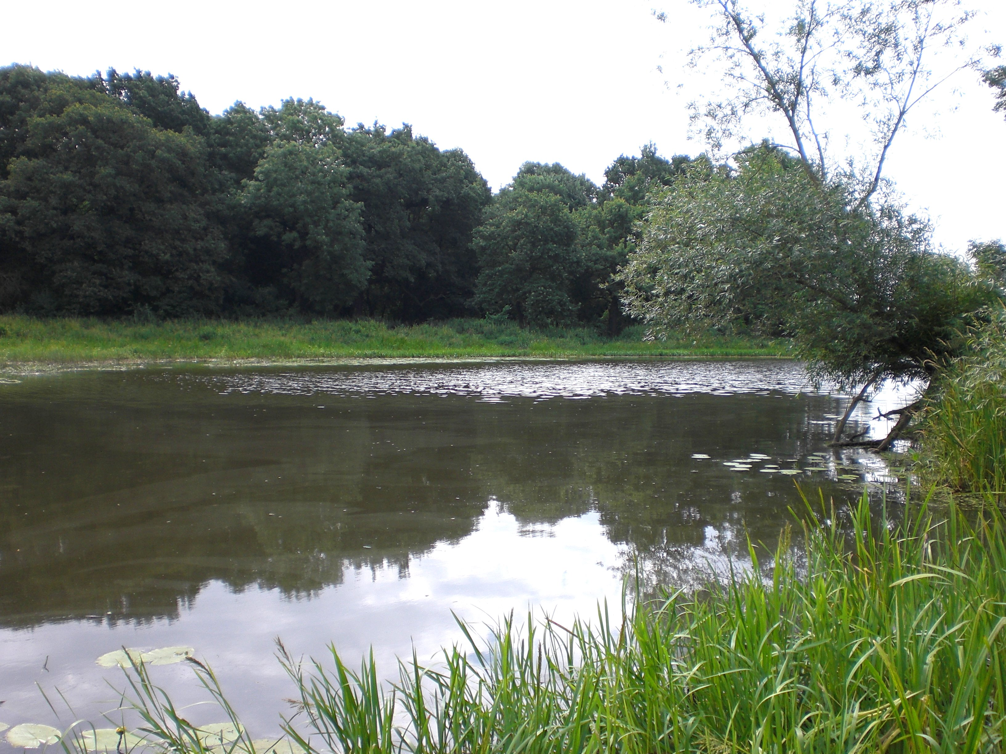 See Kuhlenhagen in der Kreuzhorst bei Magdeburg, Blick vom westlichen Ufer nach Süden; Bereich im LSG „Mittlere Elbe“